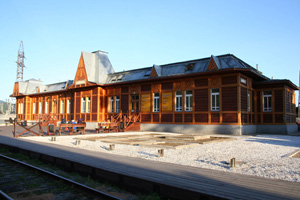 Bajkal station